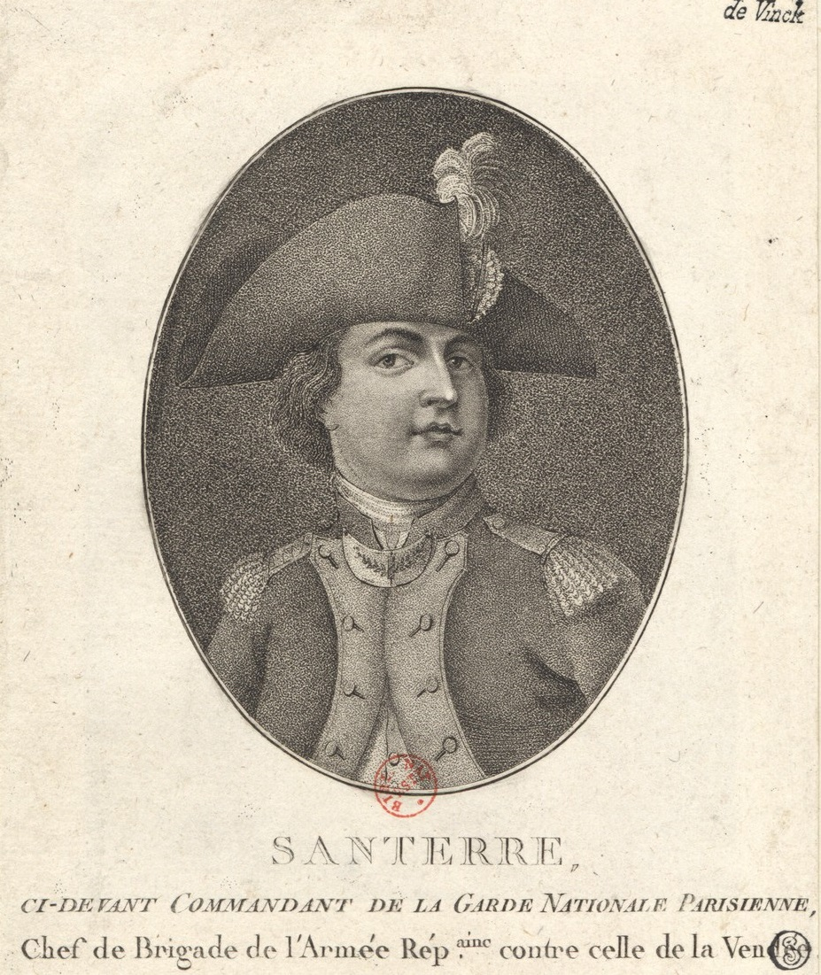 Santerre : ci-devant commandant de la Garde nationale parisienne : chef de brigade de l'armee rép.aine contre celle de la Vendée (estampe)